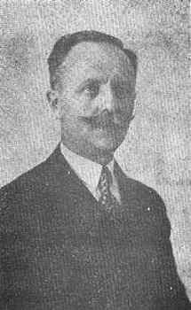 Српски (ћирилица): Милан Влајинац, српски агроном и научник